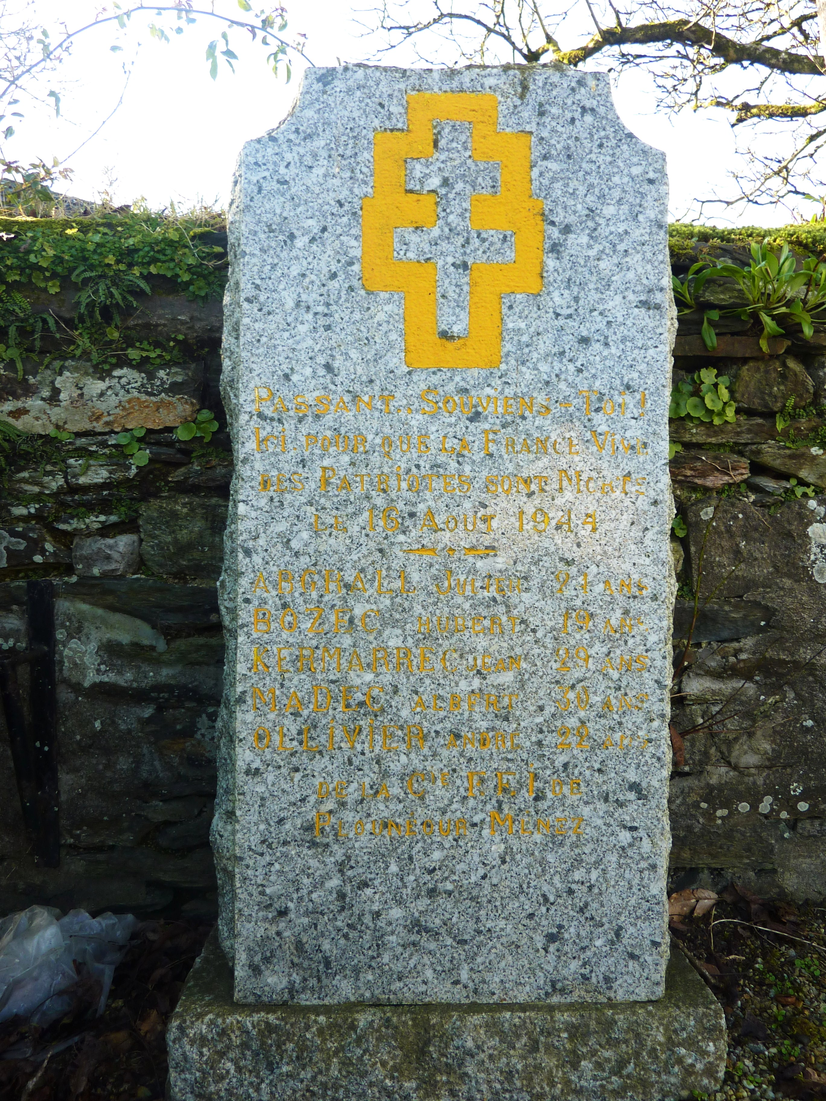 Le Tréhou : stèle commémorative résistants, avec dessin d'une Croix de Lorraine. L'inscription dit : "Passant, souviens-toi, Ici, pour que la France vive, Des patriotes sont morts le 16 août 1944, Abgrall Julien, 24 ans ; Bozec Hubert, 19 ans ; Kermarrec Jean, 29 ans ; Madec Albert, 30 ans ; Ollivier André, 22 ans ; de la Cie FFI de Plounéour-Ménez".